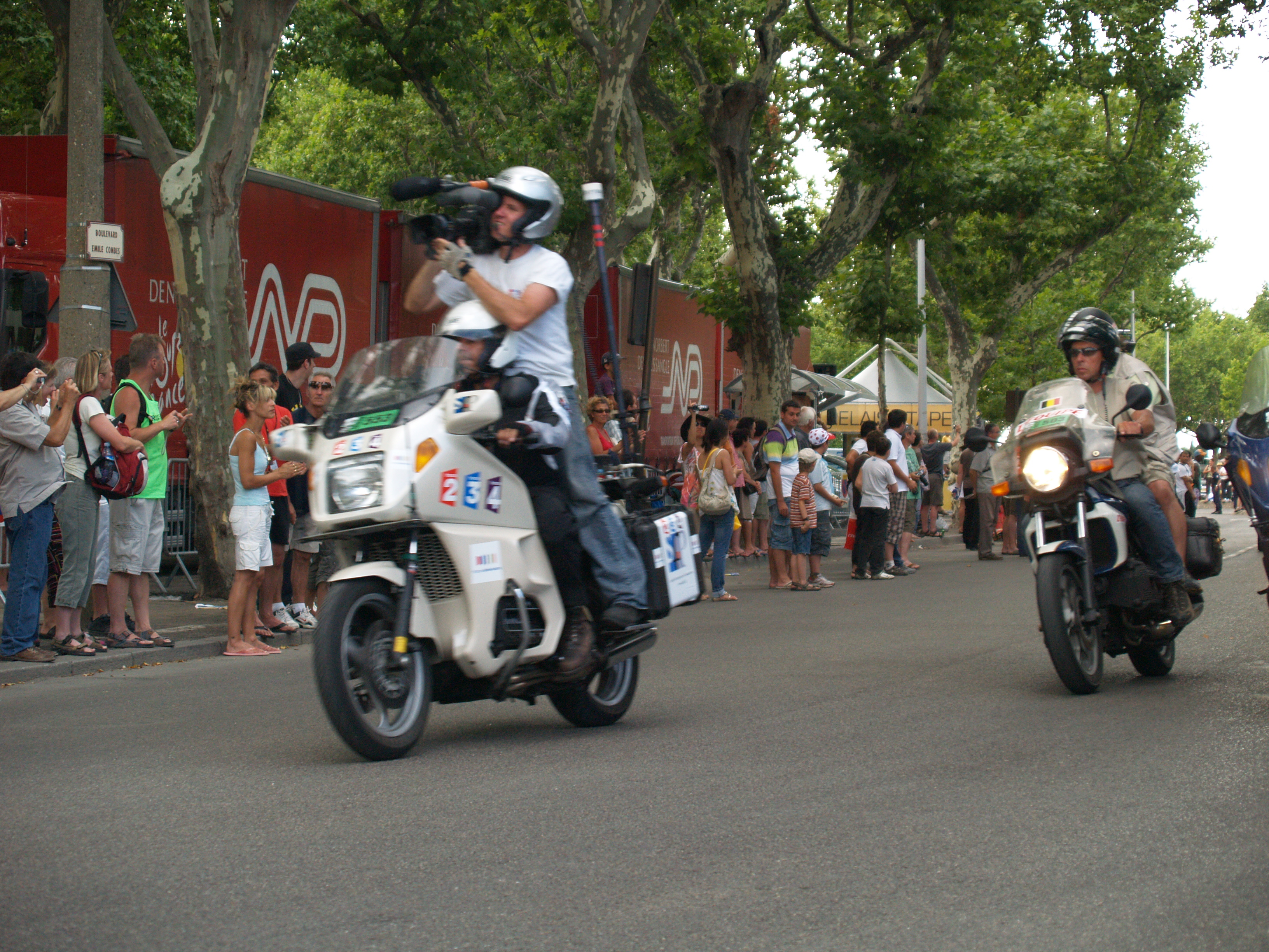 Caméraman sur moto, de France télévision, lors du tour de France 2009.